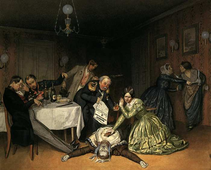 "Всё холера виновата" (It is Cholera to Blame) Художником показан случай сухой холеры (cholera sicca). У умершего цианотичный цвет лица, характерный для такого клинического течения болезни. Видимо Федотов, большой мастер жанровых сцен, отразил какие-то свои собственные наблюдения над холерой. Его картина воспроизводит обстановку страха перед холерой, охватившего русское общество во время ее третьей пандемии.